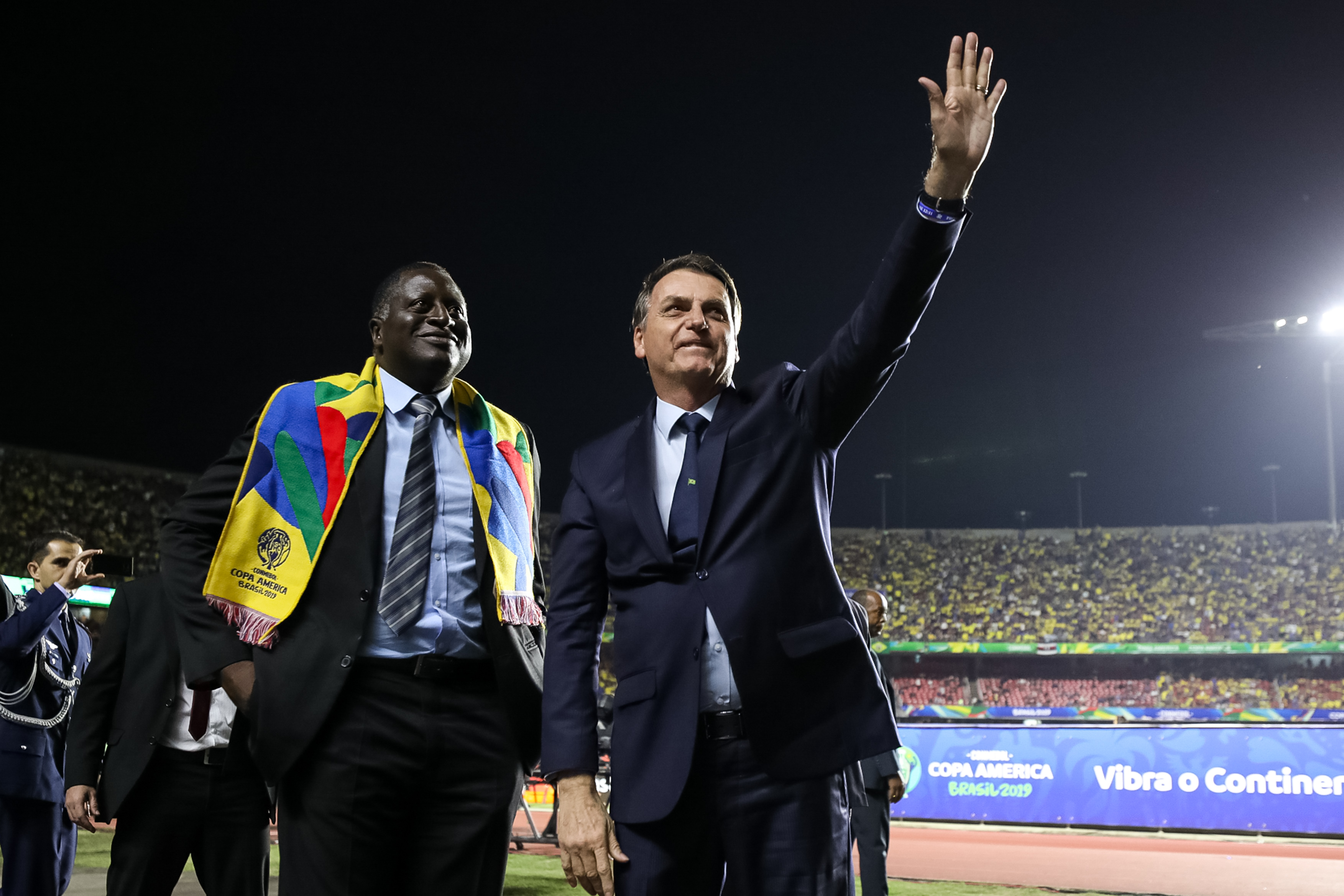 (São Paulo - SP, 14/06/2019) Presidente da República, Jair Bolsonaro durante Abertura da Copa América Brasil 2019. Foto: Marcos Corrêa/PR